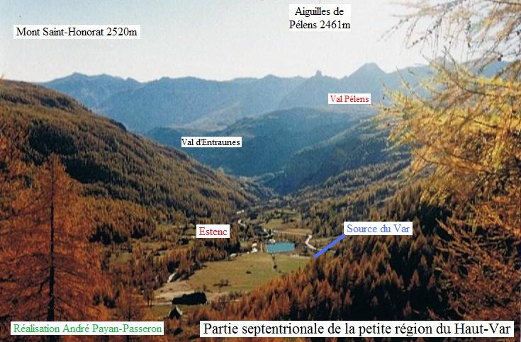 Vue du Nord, partie septentrionale de la petite région du Haut-Var en aval du col de la cayolle (2326m) dans le département des Alpes maritimes (FRANCE) Union Européenne